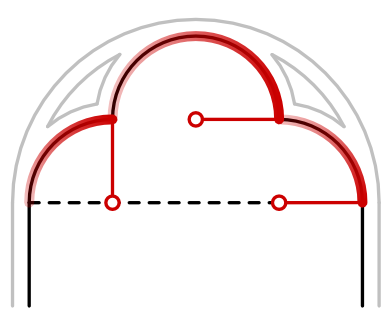 Konstruktionsskizzen für verschiedene Bogenformen